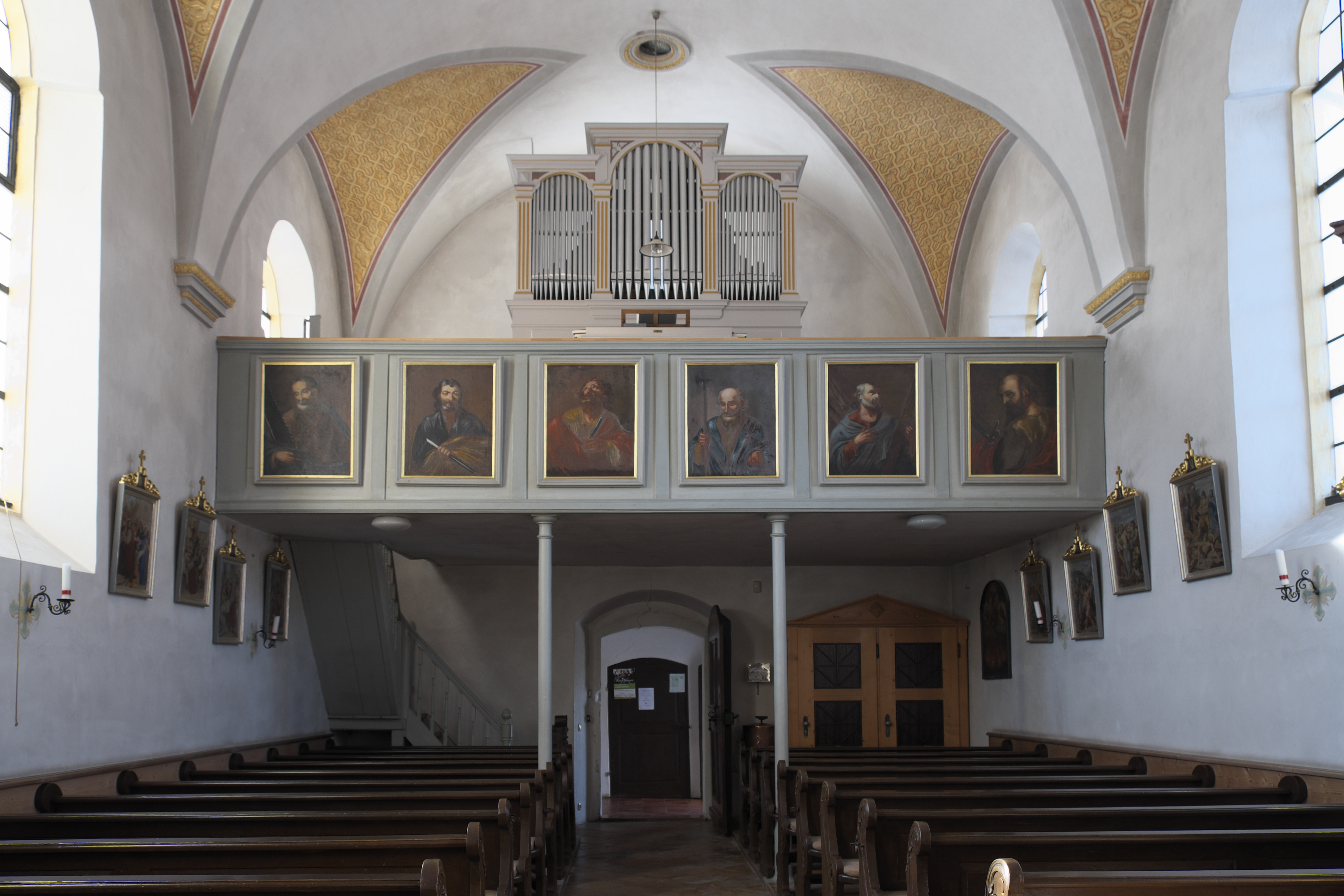 Katholische Pfarrkirche St. Michael in Marnbach (Weilheim in Oberbayern) im Landkreis Weilheim-Schongau (Bayern/Deutschland), Orgelempore